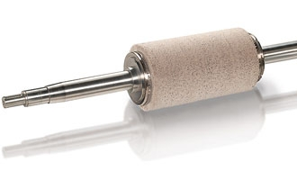 Schleifwalzenbürste mit sehr hoher Besatzdichte und geschliffener Oberfläche